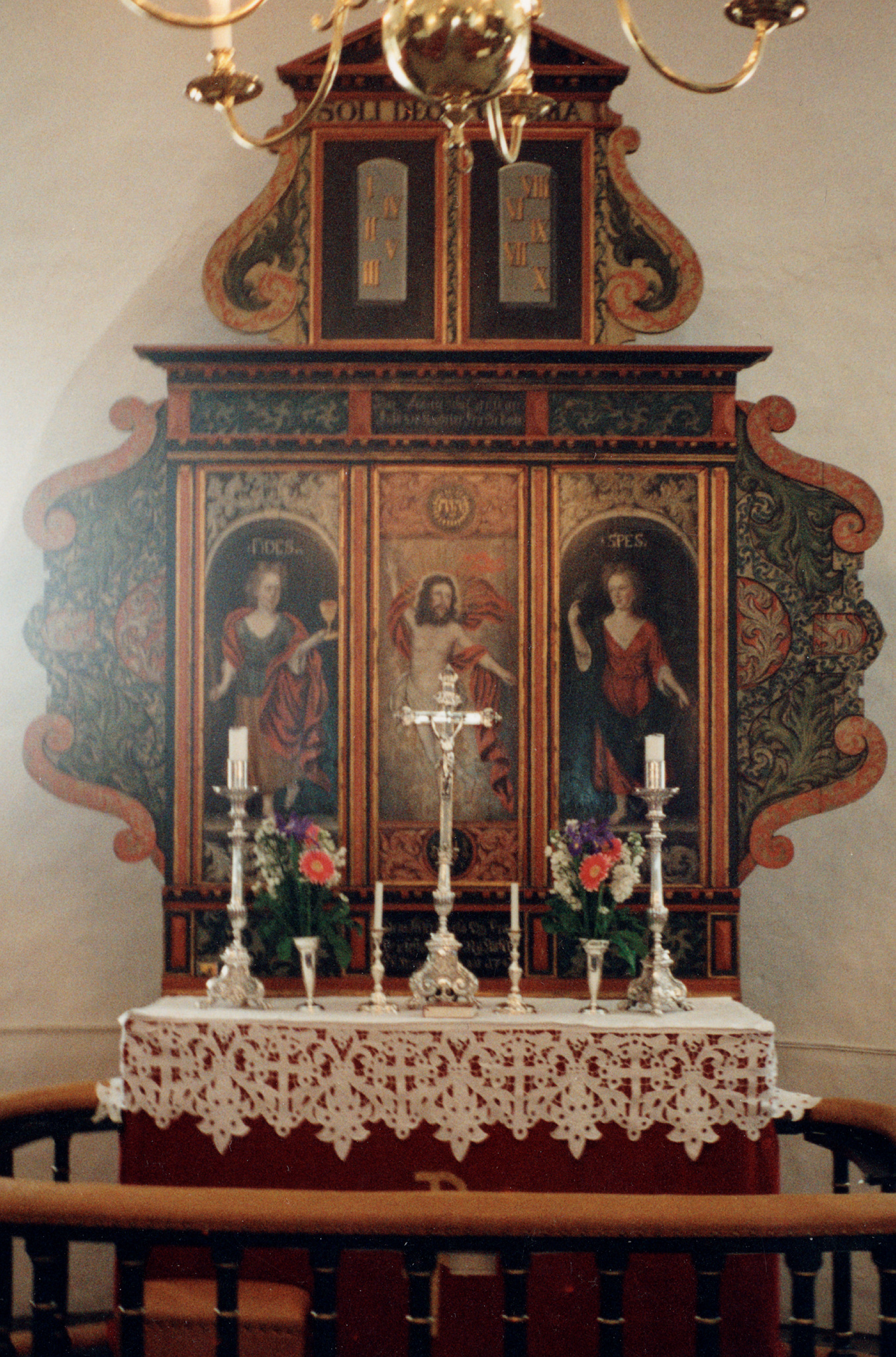 Altertavlen i Høvåg kirke. Ukjent fotograf, fra Riksantikvarens Kulturminnebilder.no.